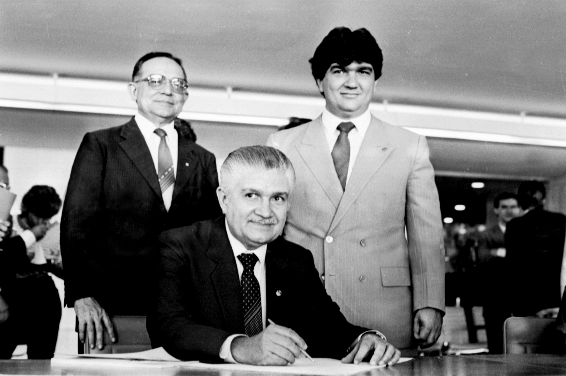 Assinatura da Constituição em 29/09/1988. Participantes - Sen Mauro Benivides. Foto: Célio Azevedo